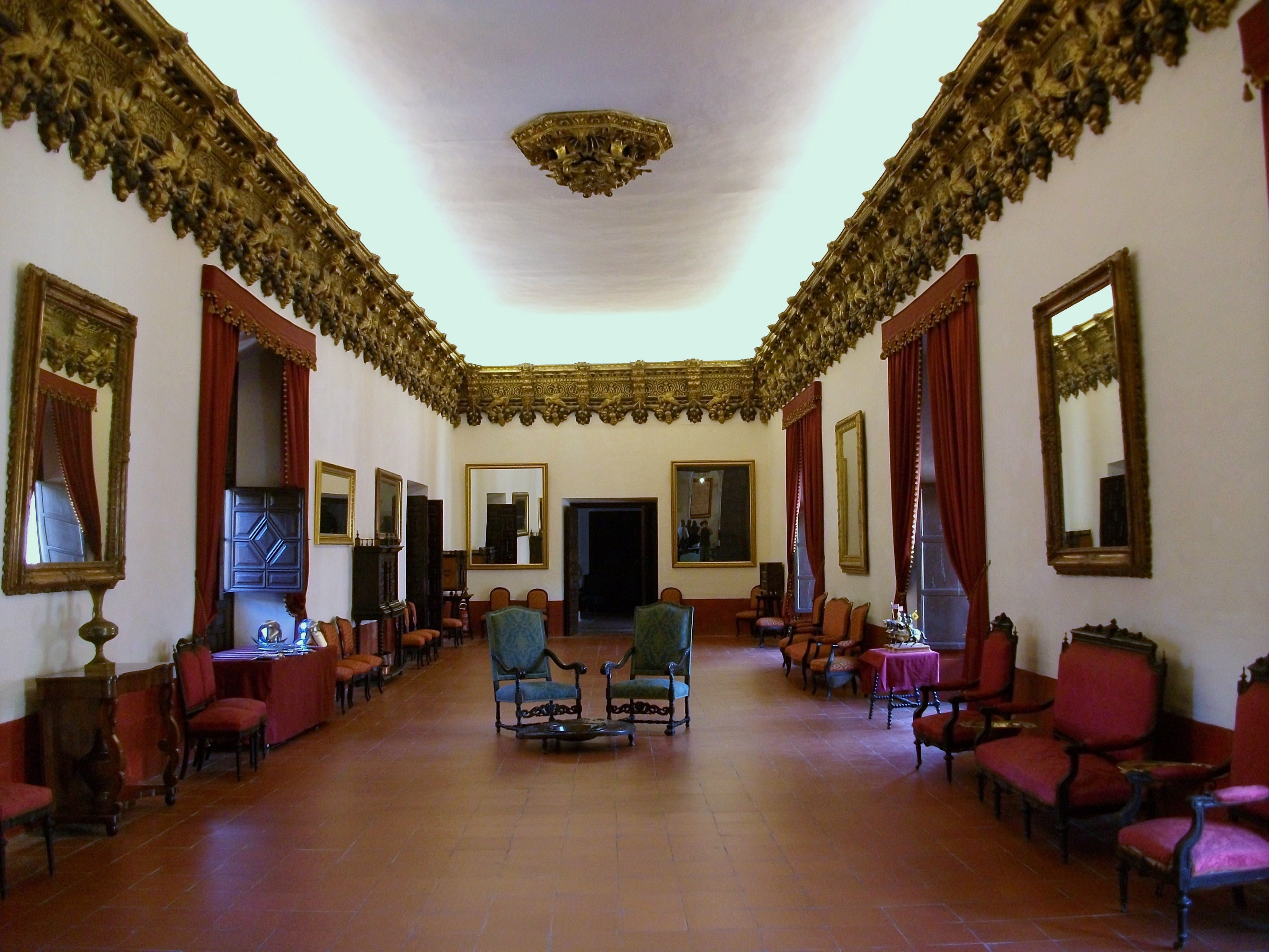 Sala de Sant Miquel o Saló de les Àguiles del Palau Ducal de Gandia.